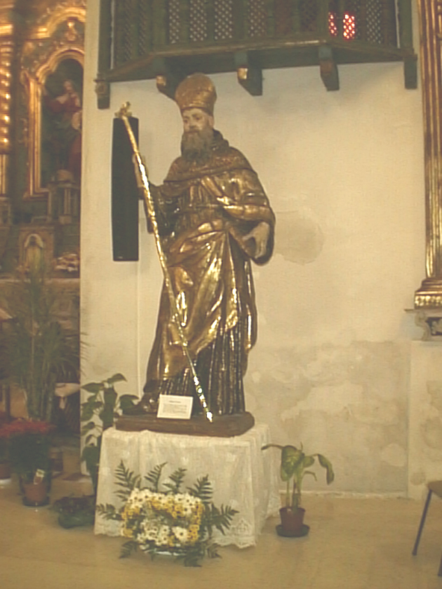 Statua del titolare nella chiesa di Sant'Agostino (XVI secolo) a Cagliari